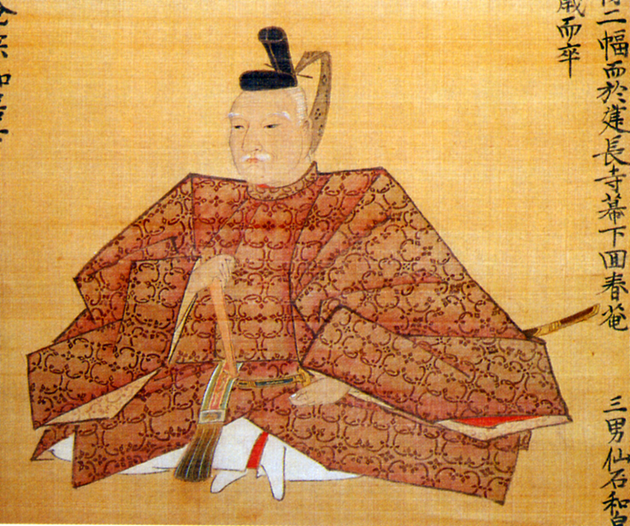 仙石忠政 Sengoku Tadamasa.